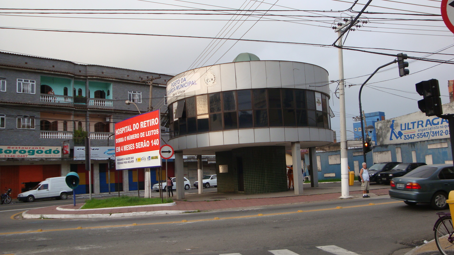 Posto da Guarda Municipal No Retiro